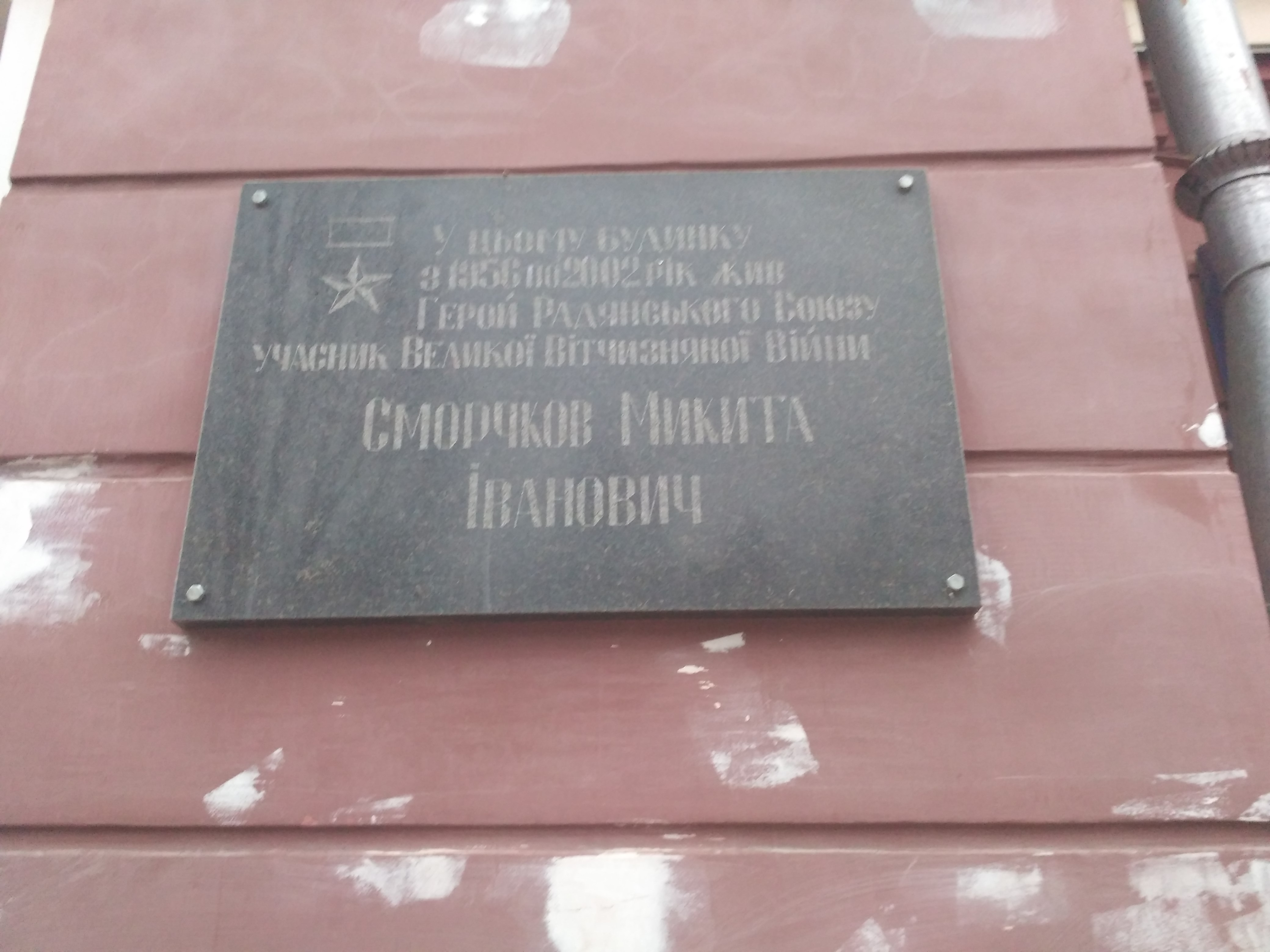 Памятная доска Герою Советского Союза Никите Сморчкову в Чернигове.